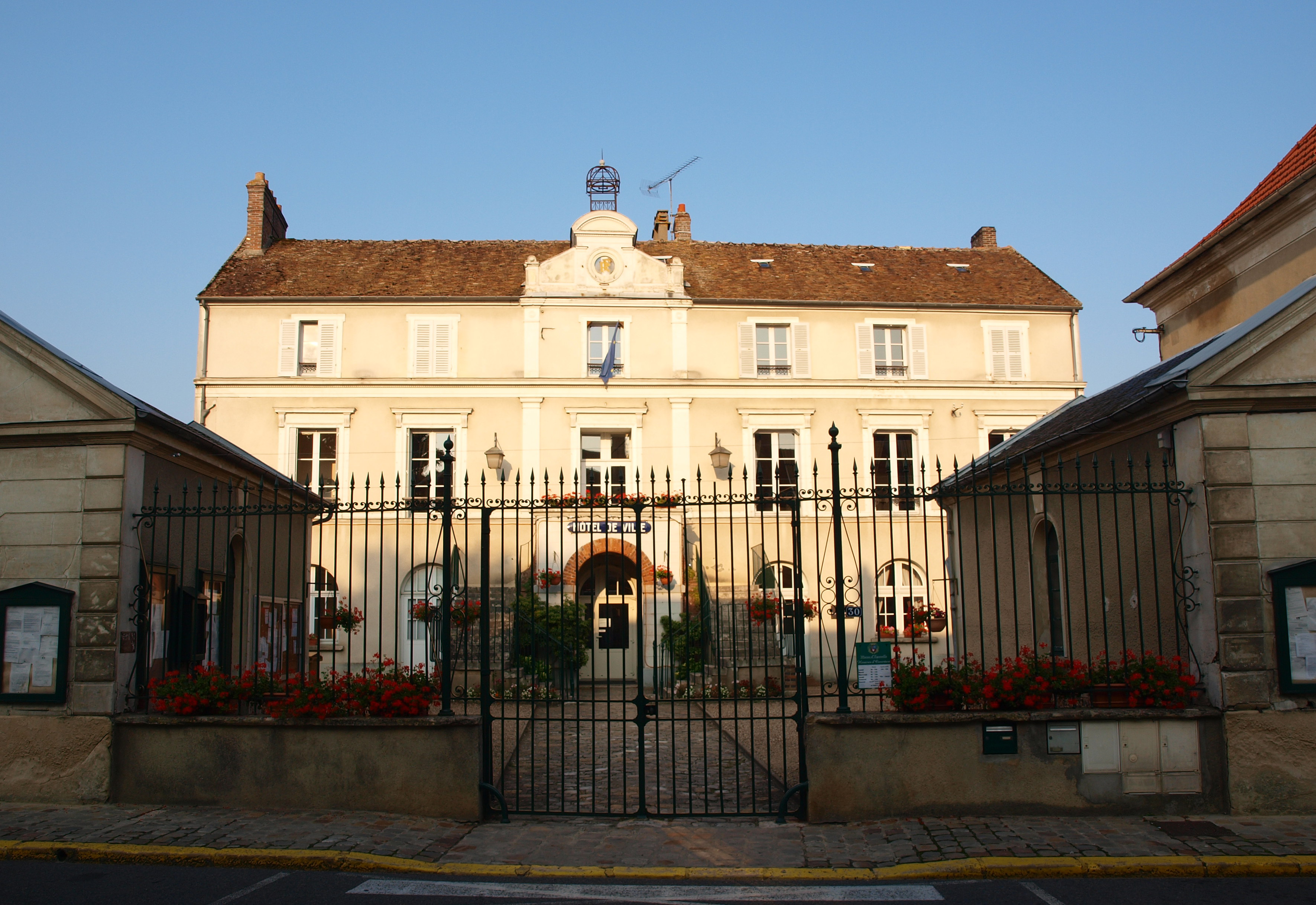 Égreville (Seine-et-Marne, France) ; mairie